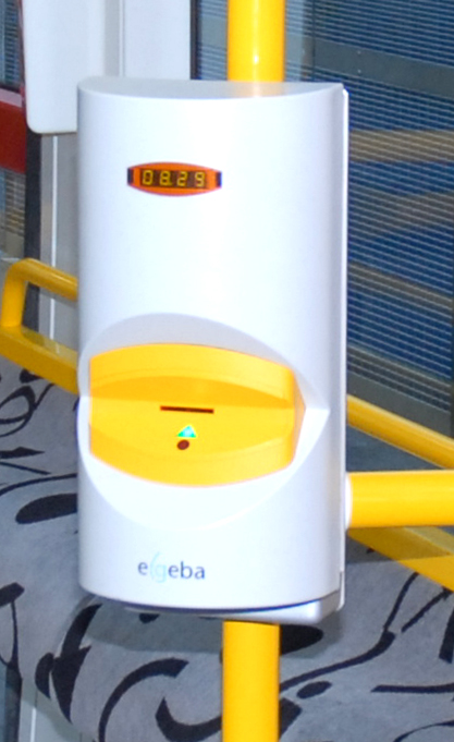 Elgeba stempelapparaat in een tram te Mulhouse